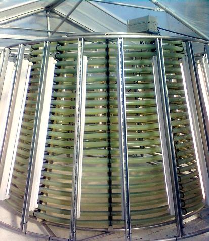 Ansicht Photobioreaktor, Tannenbaumreaktor nach GICON(R)